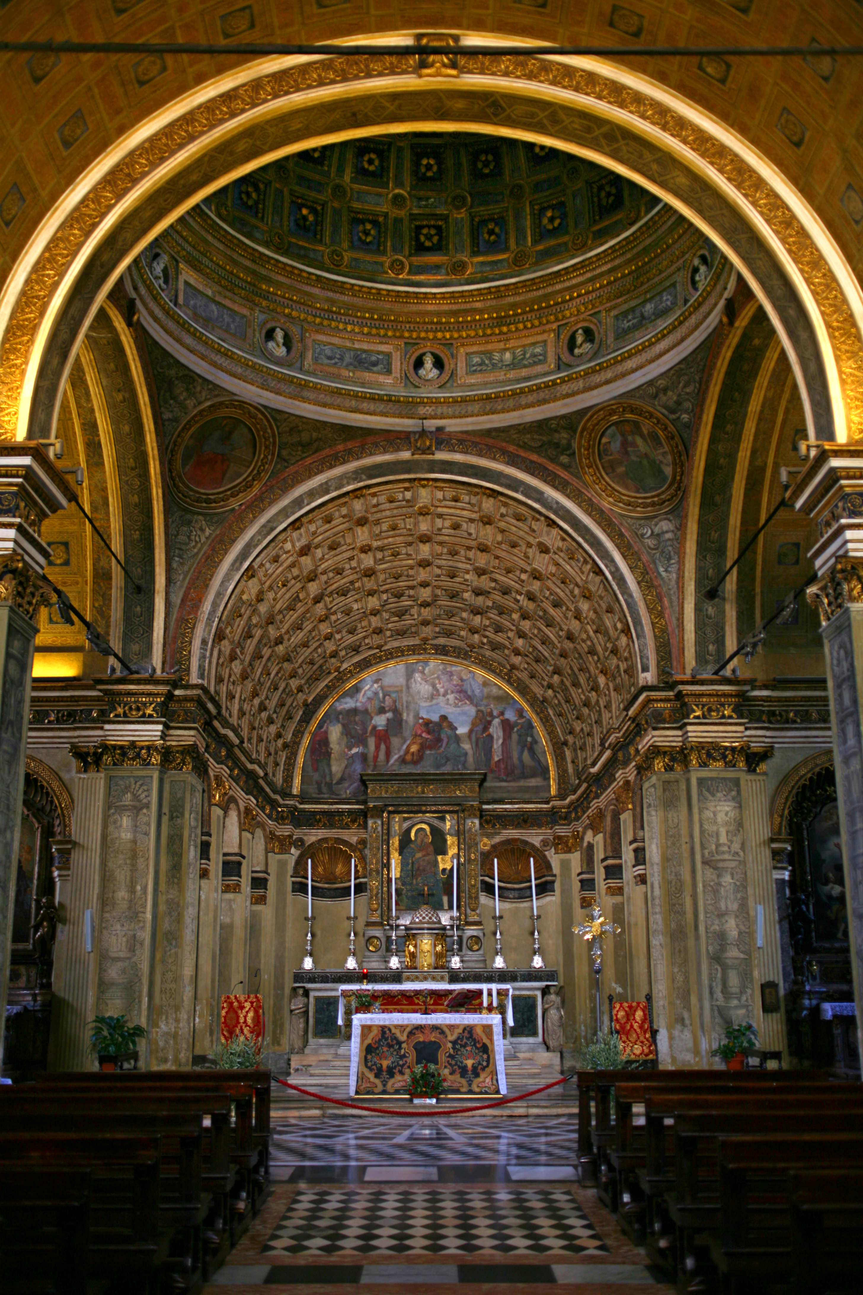 La chiesa di San Satiro a Milano nelle sue viste esterne e interne